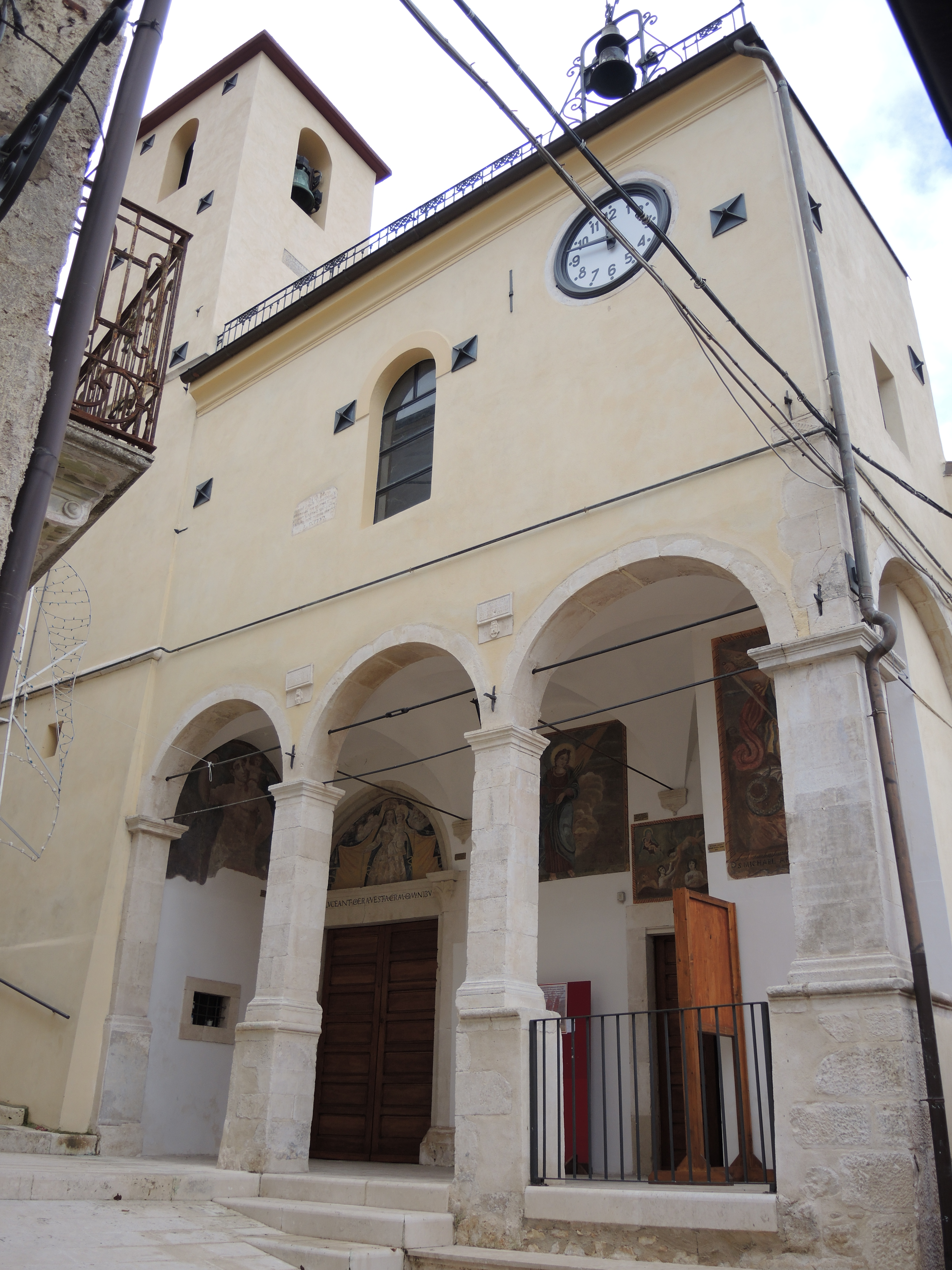 Prezza